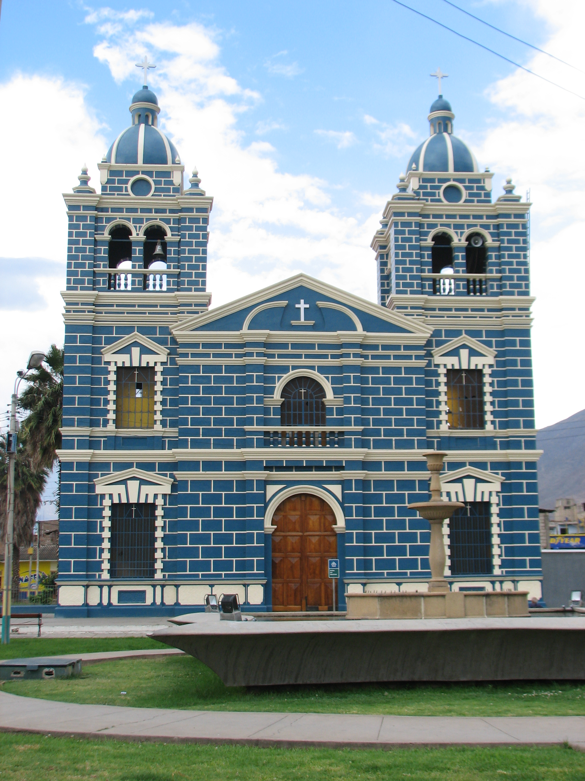 San Sebastian Church in Huánuco/Huánuco/Huánuco, Peru.